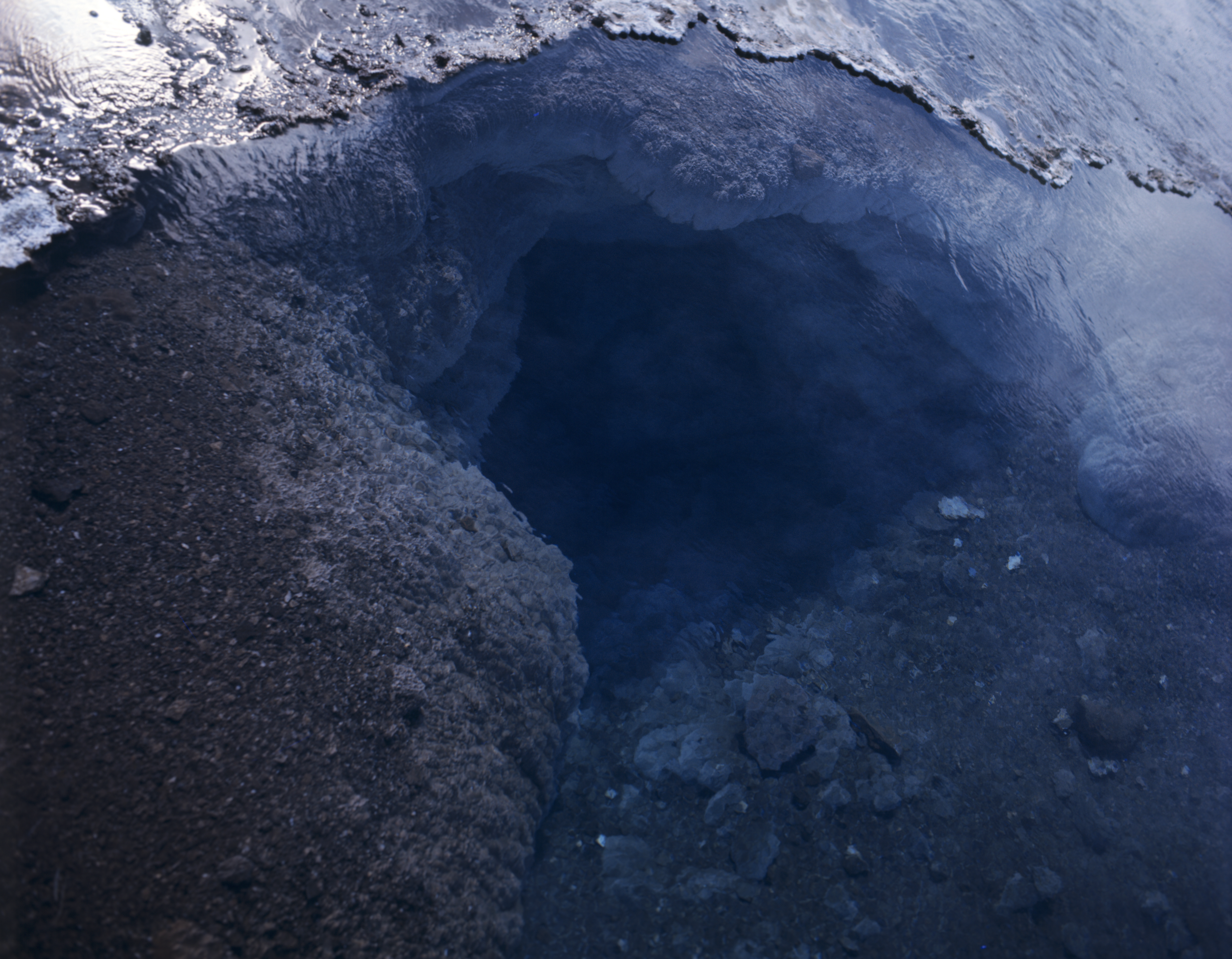 Heiße Quelle im Thermalgebiet von Geysir